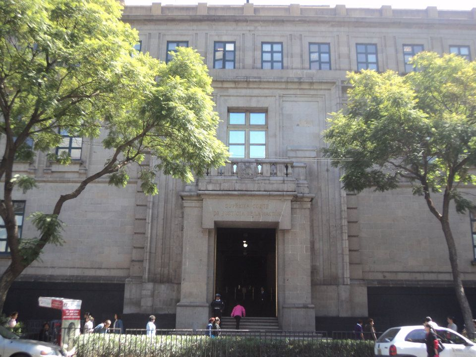 suprema corte de justicia de la nacion